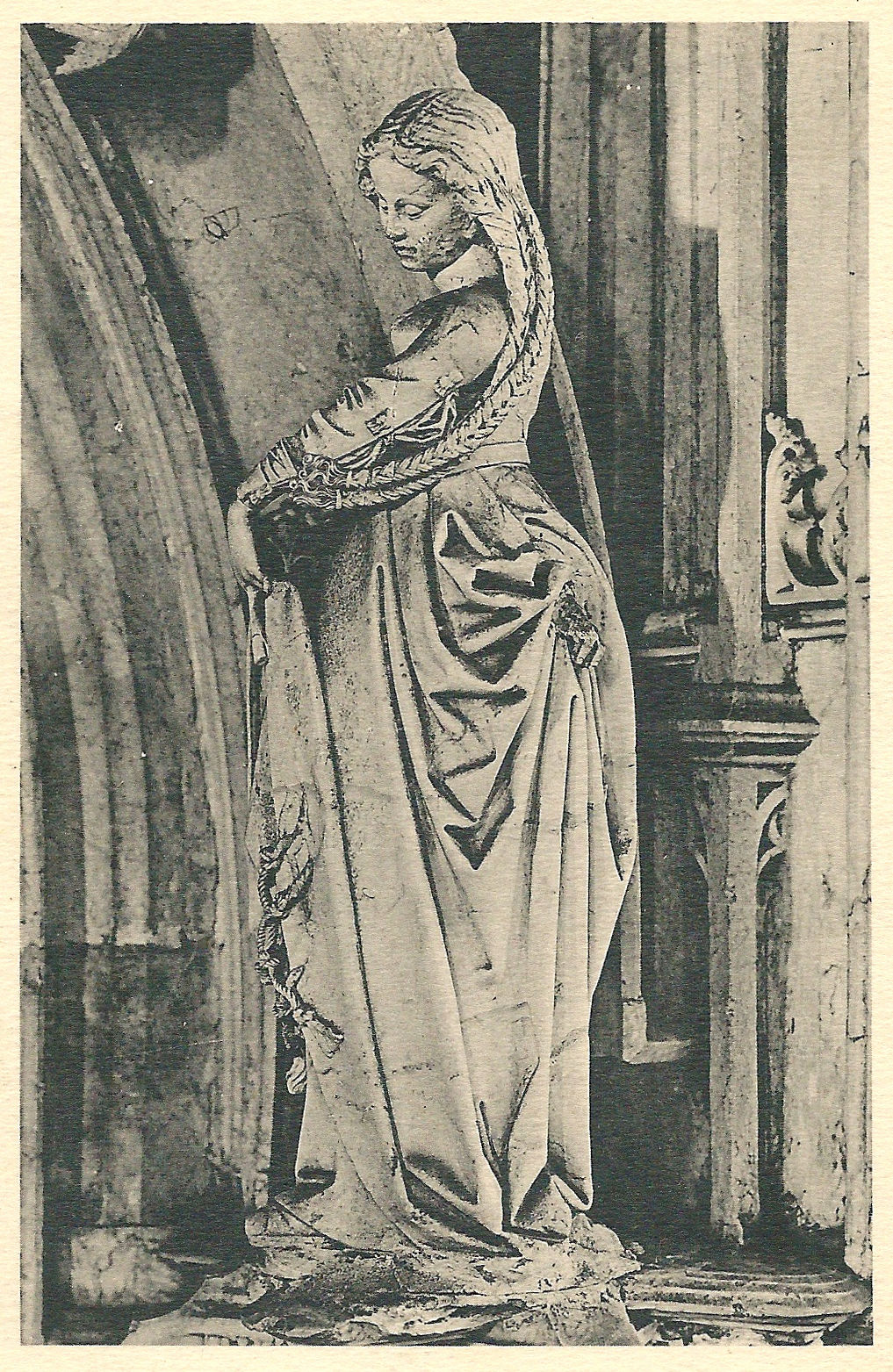 Bourg-en-Bresse (Ain, France) ; Église Saint-Nicolas-de-Tolentin de Brou ; détail du tombeau de Philippe II de Savoie.